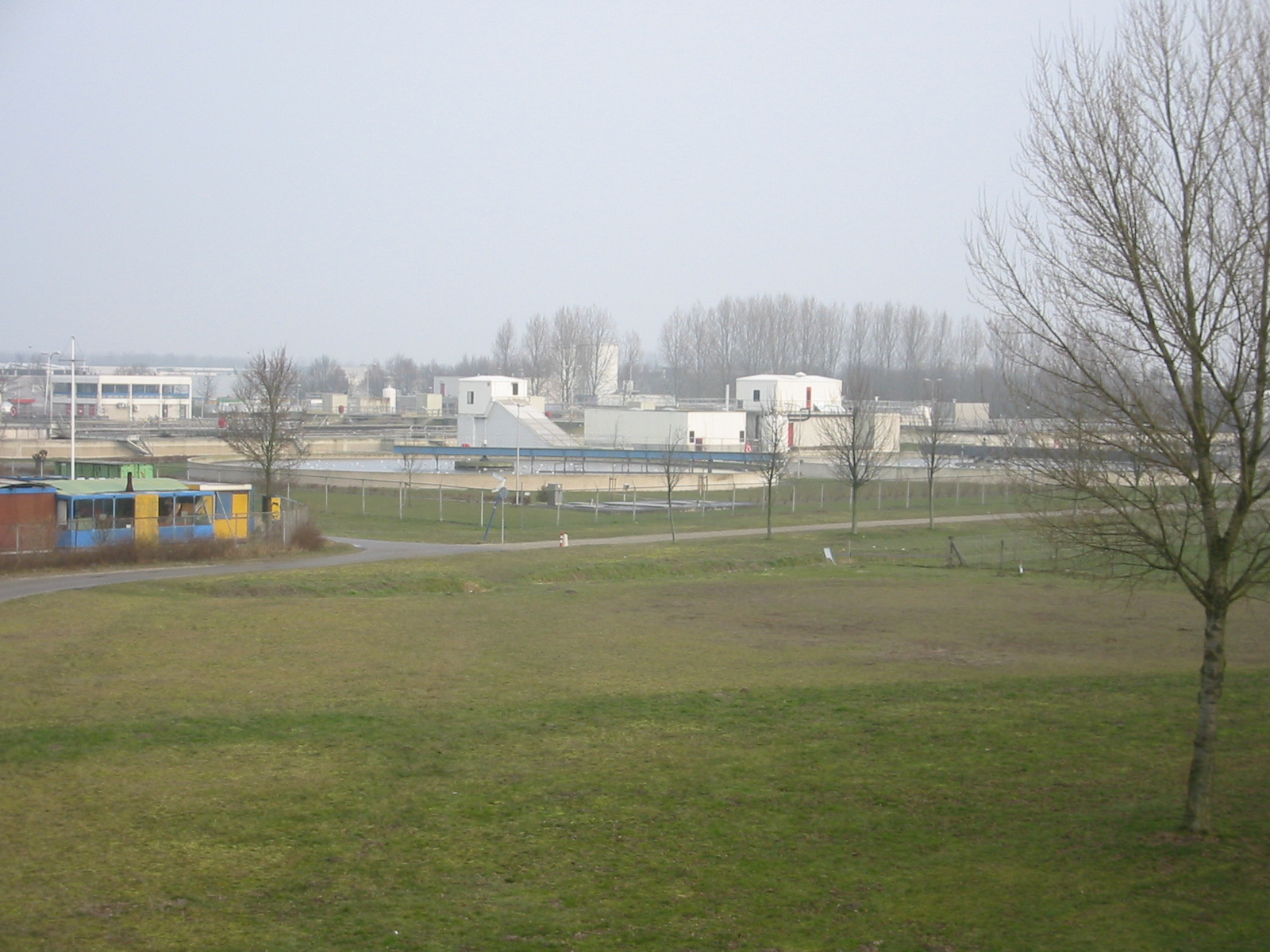 Mijn plaatje: Rioolwaterzuiveringsinstallatie te Almere. GerardM 6 mrt 2004 23:25 (CET) Bild:RWZI.JPG Image:SewageTreatment.JPG